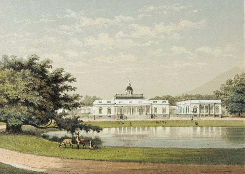 Litho. Litho naar een oorspronkelijke aquarel van J. Rappard.. Het paleis van de gouverneur- generaal in Buitenzorg